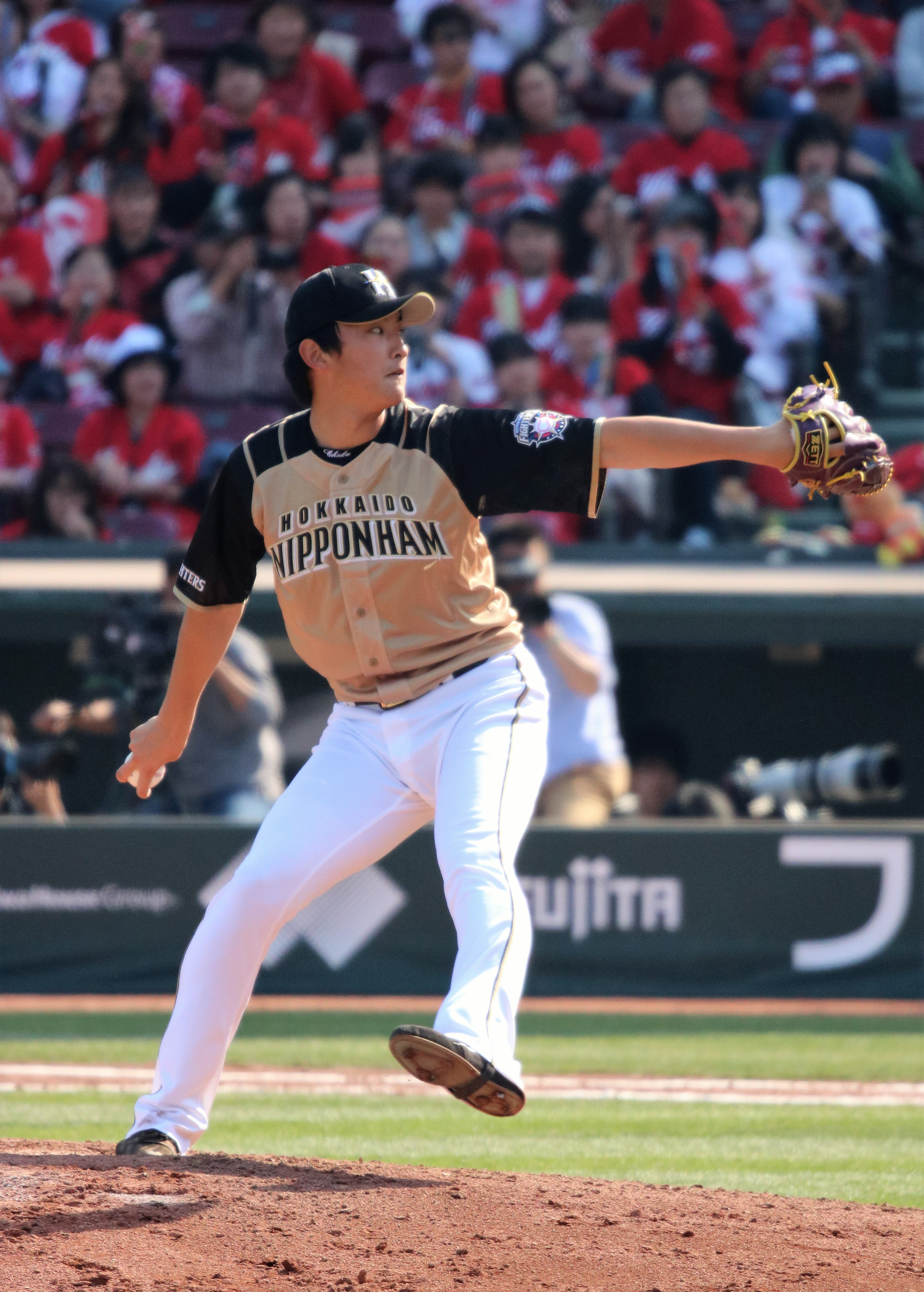 2018/3/14マツダスタジアム